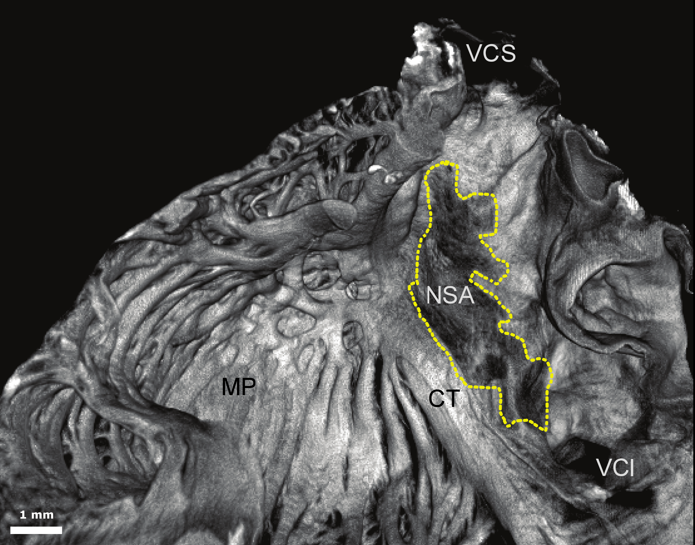 Figura 3.B. Identification del Nodo sino-atrial. Imagen 3-D recontruída, a partir de múltiples cortes transversales de la pared libre de la auricula derecha, mediante microTC. Muestra el NodoSA. (B) Imagen 3-D endocárdica de la aurícula derecha. El NodoSA se muestra delimitado en su verdadera posición y extensión (línea punteada amarilla), sobre la superficie del endocardio. Corazón de conejo teñido con I2KI. CT- crista terminalis, VCS- vena cava superior, VCI - vena cava inferior, MP- músculo pectíneo, AR- aurícula derecha, NSA- nodo seno-auricular. (Escala de la barra 1 mm).